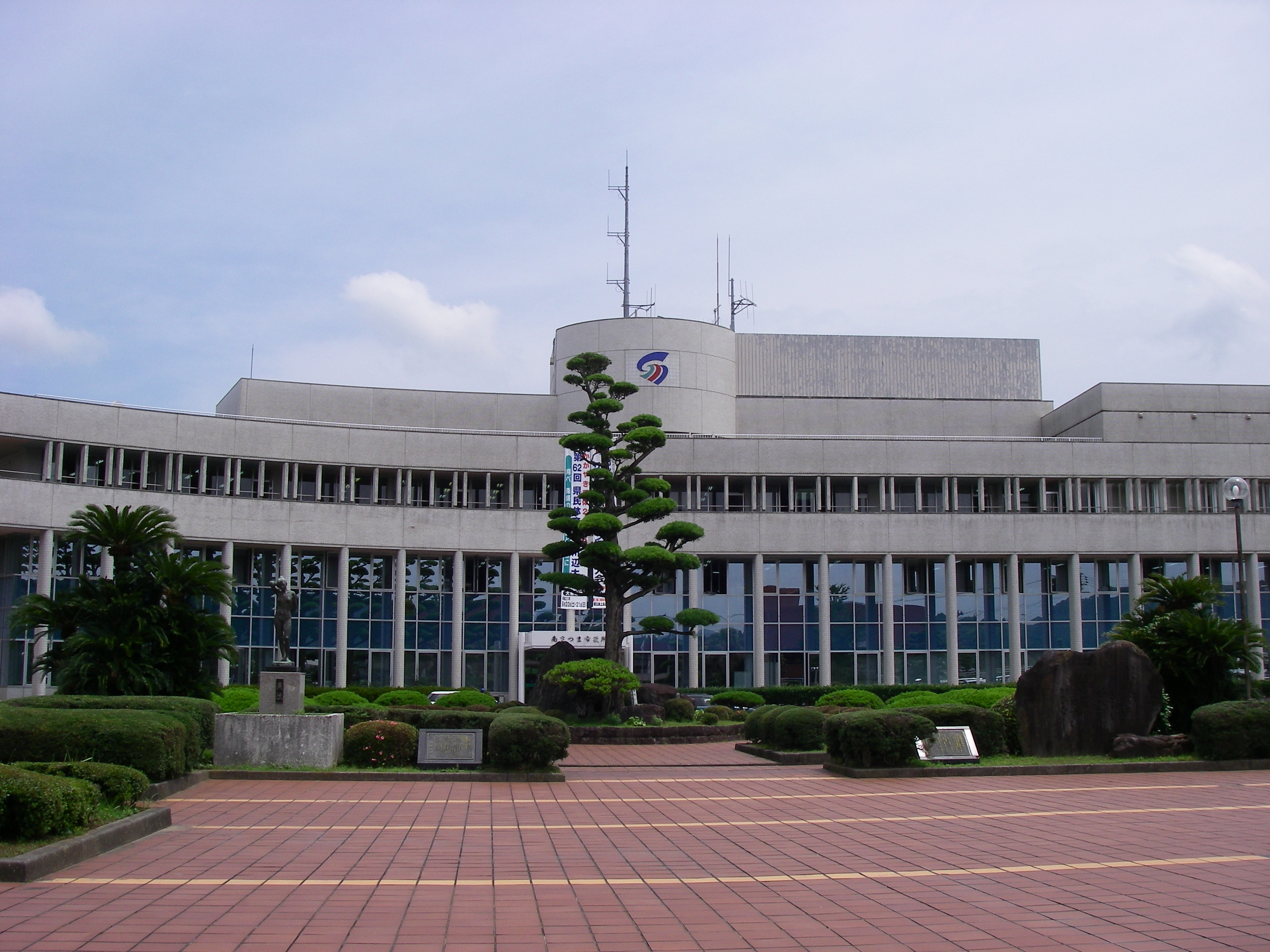 Minamisatsuma City Hall in Kagoshima, Japan